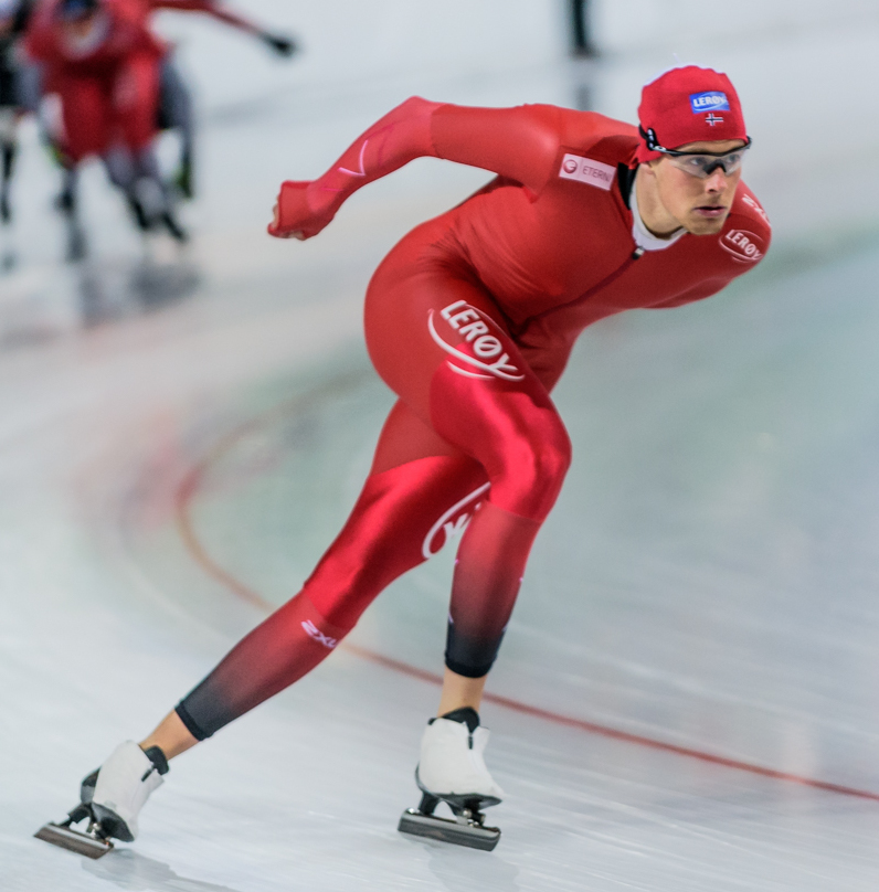 Landslagstrening i Vikingskipet